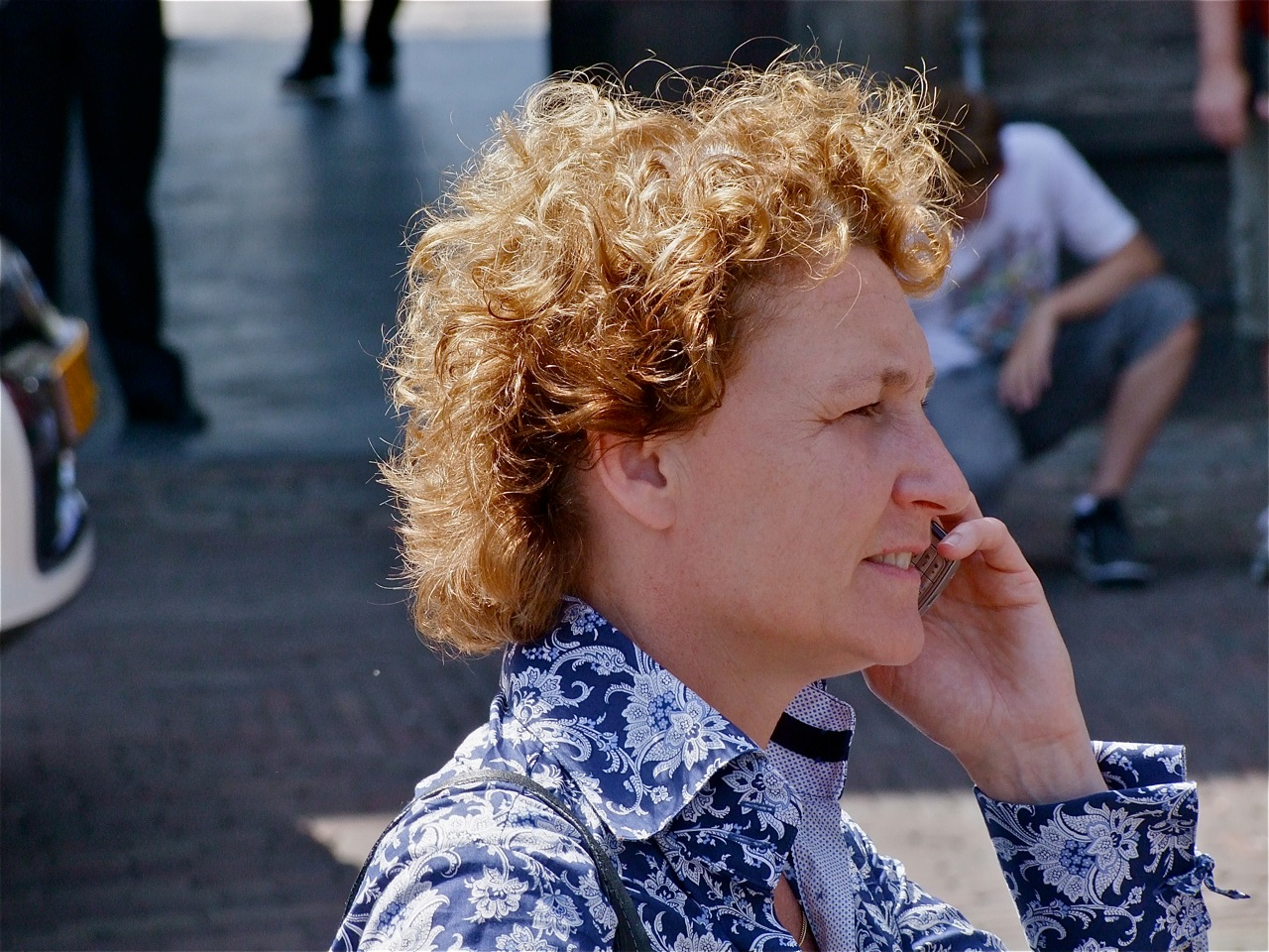 Dominique van der Heyde is een Nederlands journalist bij het NOS Journaal.